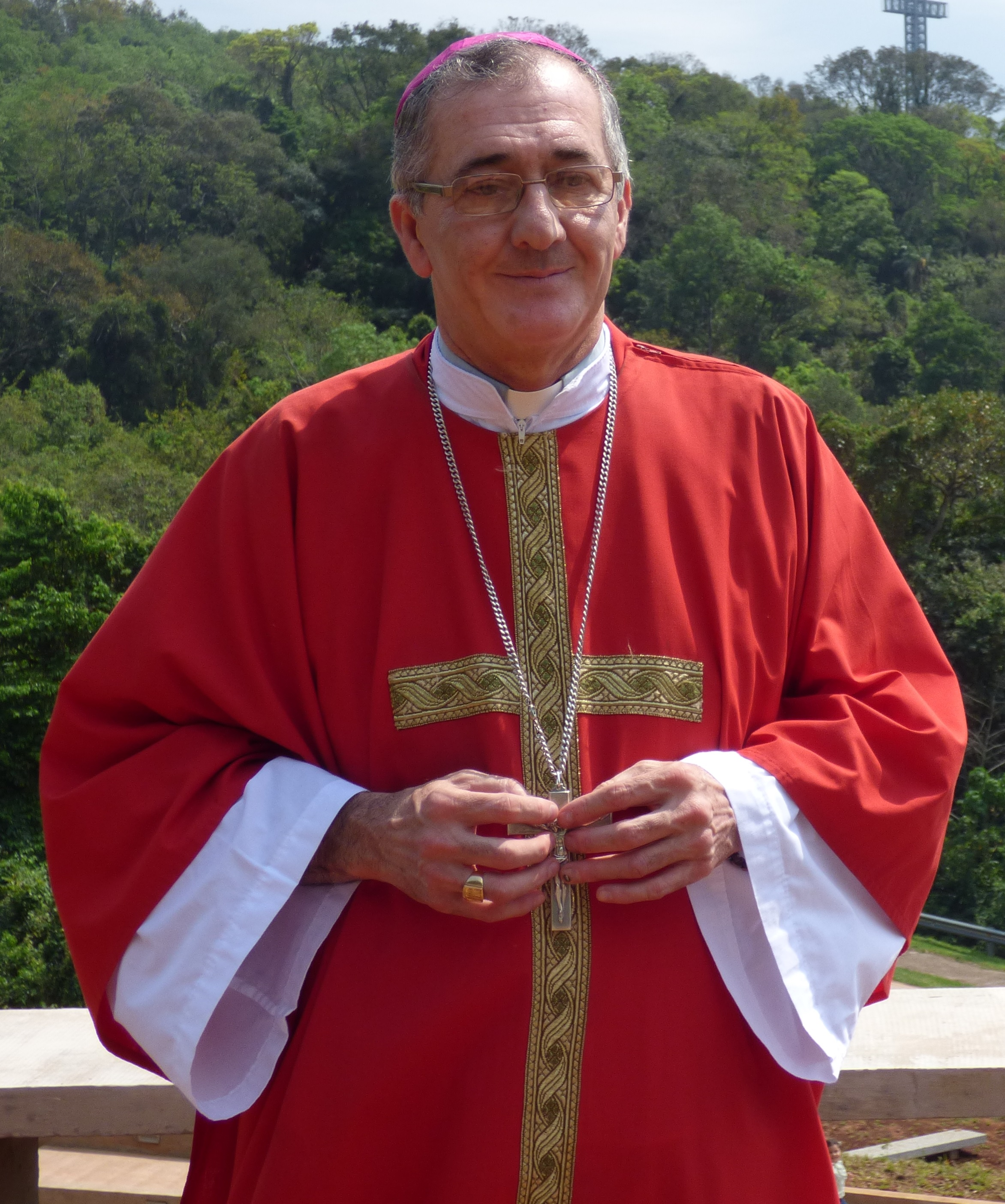 Mons. Juan Rubén Martínez